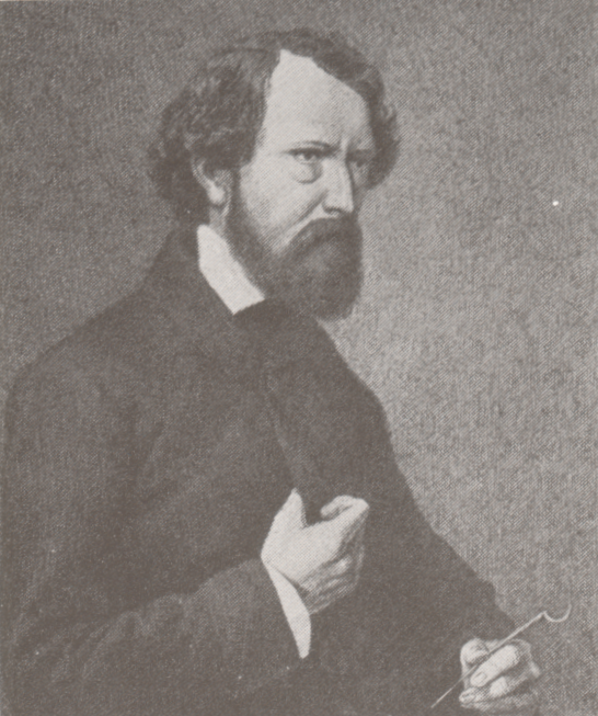 Franz Ludwig Fick (* 18. Mai 1813 in Erlangen, † 31.Dezember 1858 in MR) - Prof. der Anatomie in Marburg